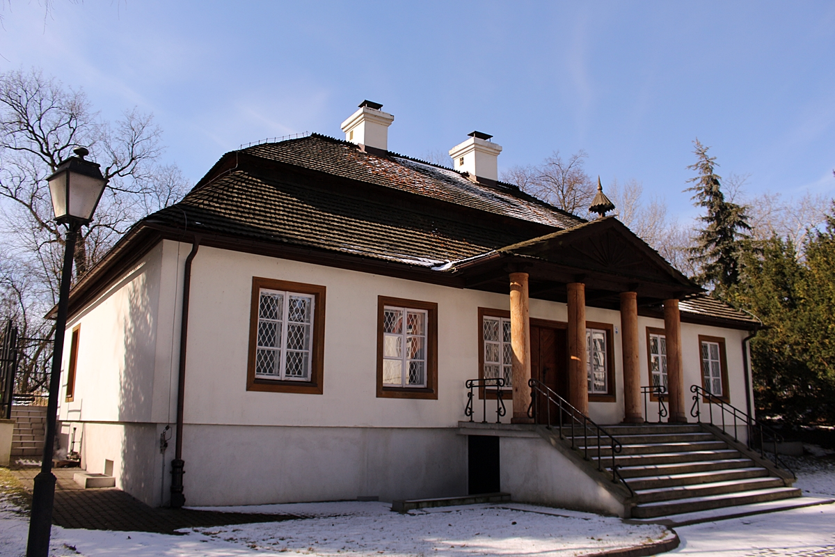 Parterowy dwór zbudowany przez Józefa Kantego Ossolińskiego, który powstał w pierwszej połowie XVIII wieku